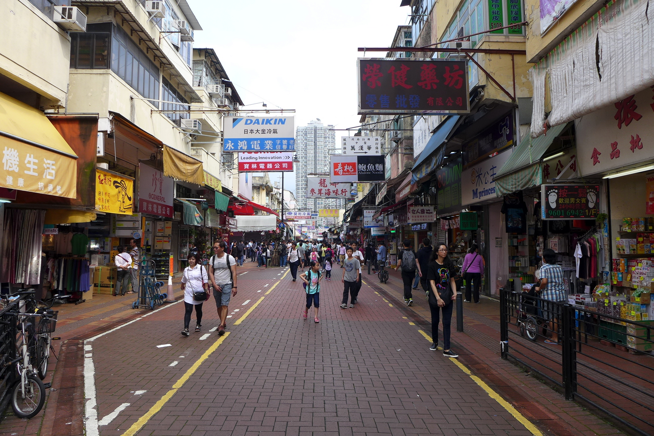 San Hong Street, Sheung Shui